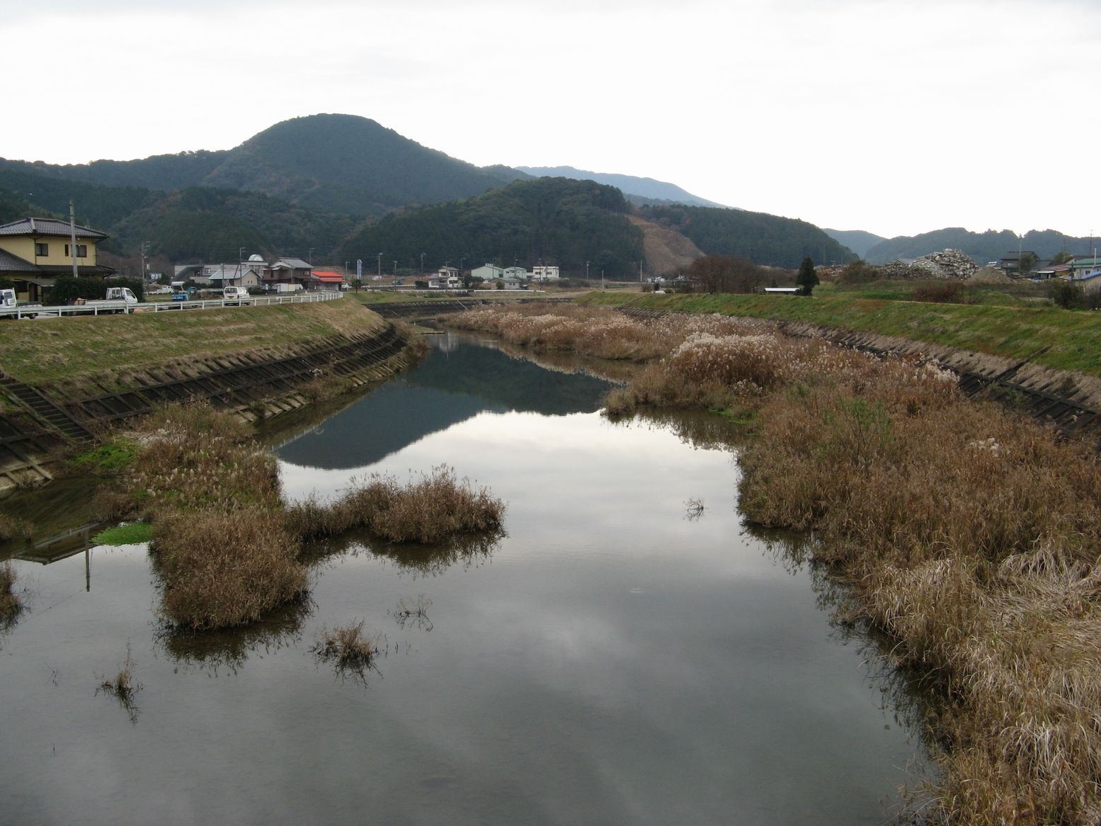 三間川 陽路橋から東望